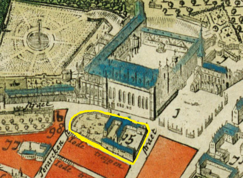 Belgique, Bruxelles, La Cour d'Hoogstraeten entourée d'un trait jaune sur le plan de Fricx dressé en 1712